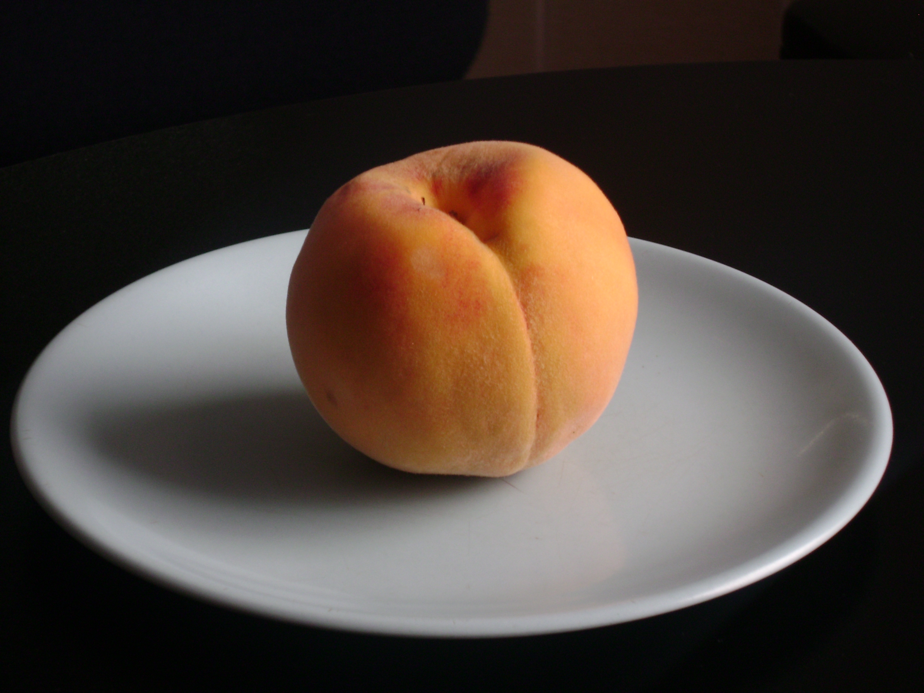 Un durazno enfocado a luz baja